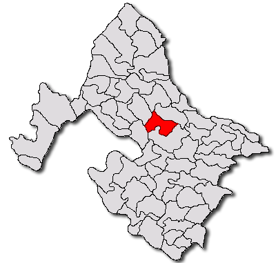 Categorie:Hărţi ale judeţului Mehedinţi